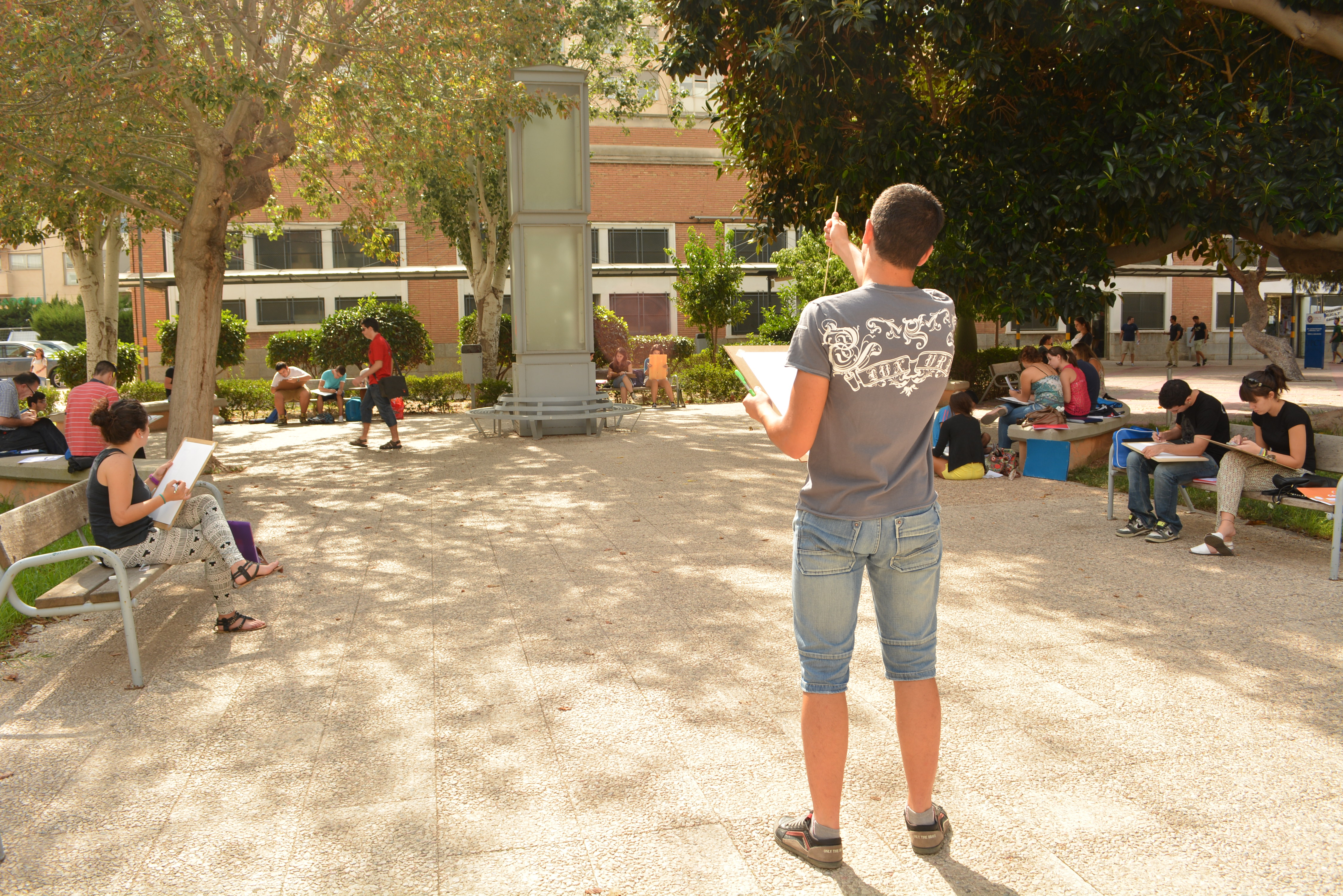 Alumnos de la Escuela de Arquitectura e Ingeniería de Edificación realizando una práctica de dibujo frente a la luminaria del Campus de Alfonso XIII.